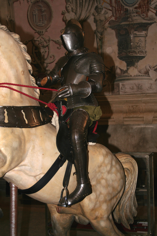 Armatura completa da cavallo, XVI sec., Palazzo Duranti-Marzoli, Palazzolo sull'Oglio.